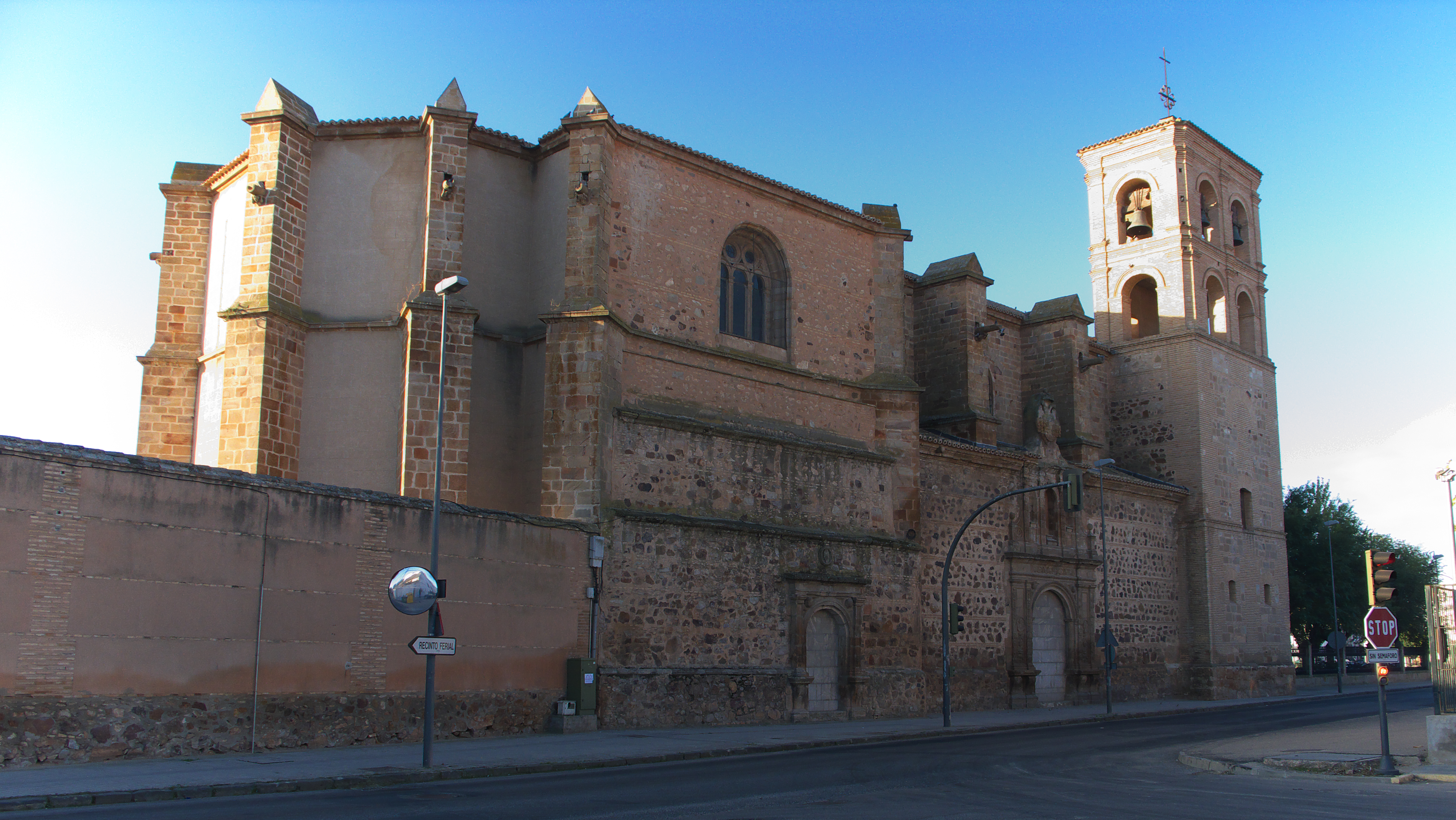 Posiblemente traza de Antón Egas y desarrollada por su sobrino Enrique Egas. Las obras sufrieron interrupciones terminándose a principios del siglo XVII.